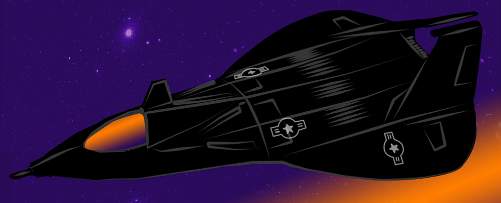 Saját rajzolású kép a fiktív F-19-es repülőgépről